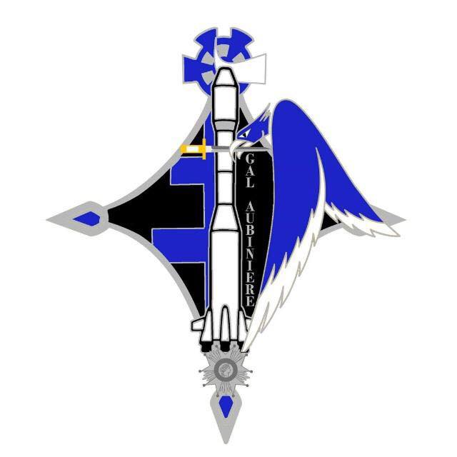 insigne de la promotion "Général Aubinière" de l'Ecole de l'Air (2017-2020)